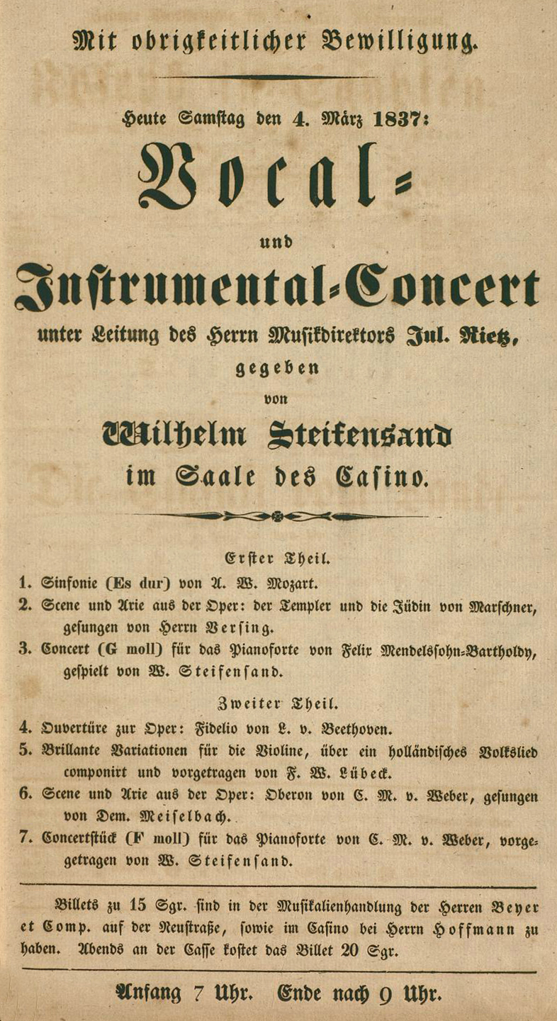 Samstag den 4. März 1837 Vocal- und Instrumental-Concert unter der Leitung des Herrn Musikdirektors Jul. Rietz gegeben von Wilhelm Steifensand im Saale des Casino